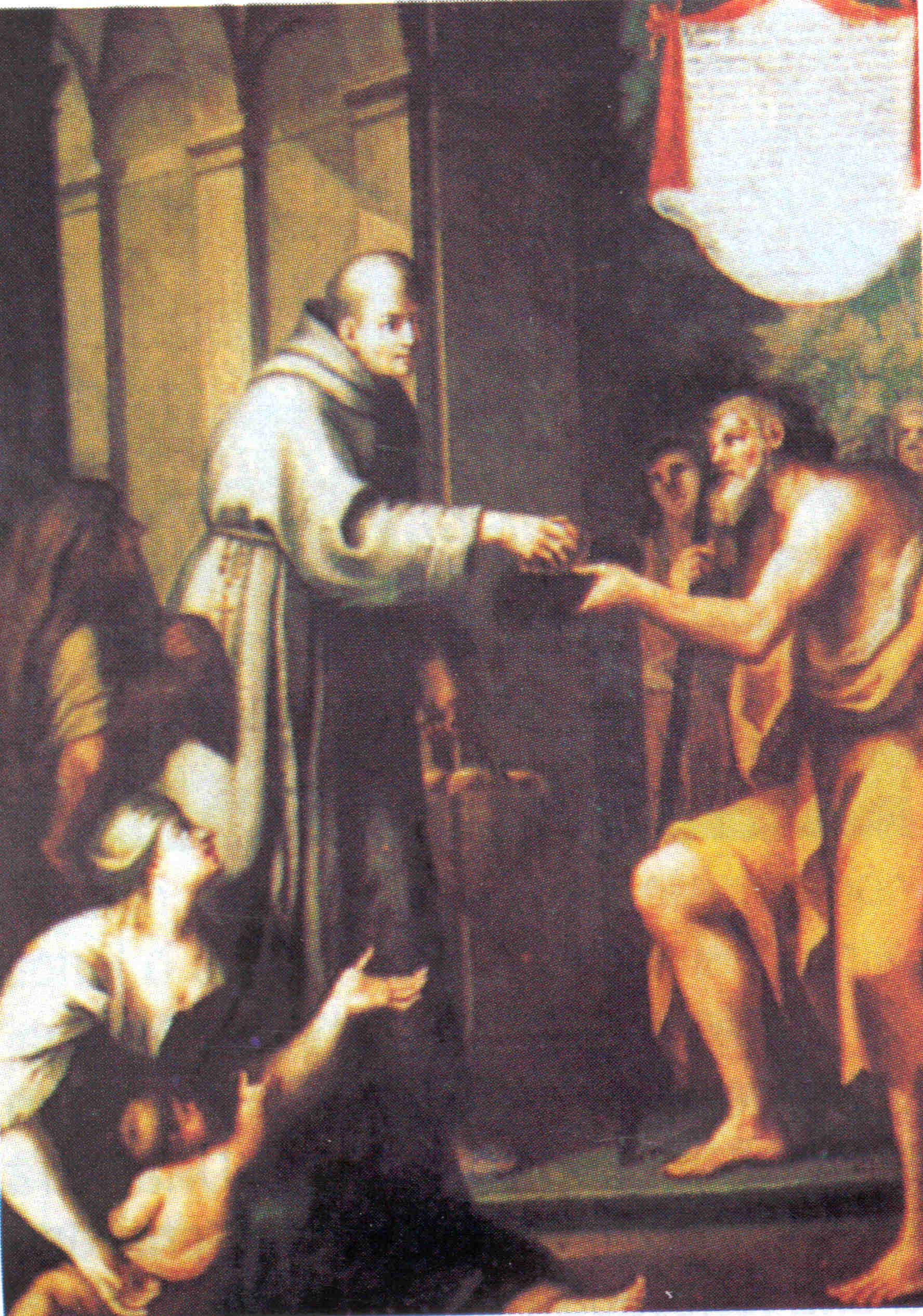 Cuadro Fray Pedro de Bardeci colocado sobre su tumba en Santiago de Chile.